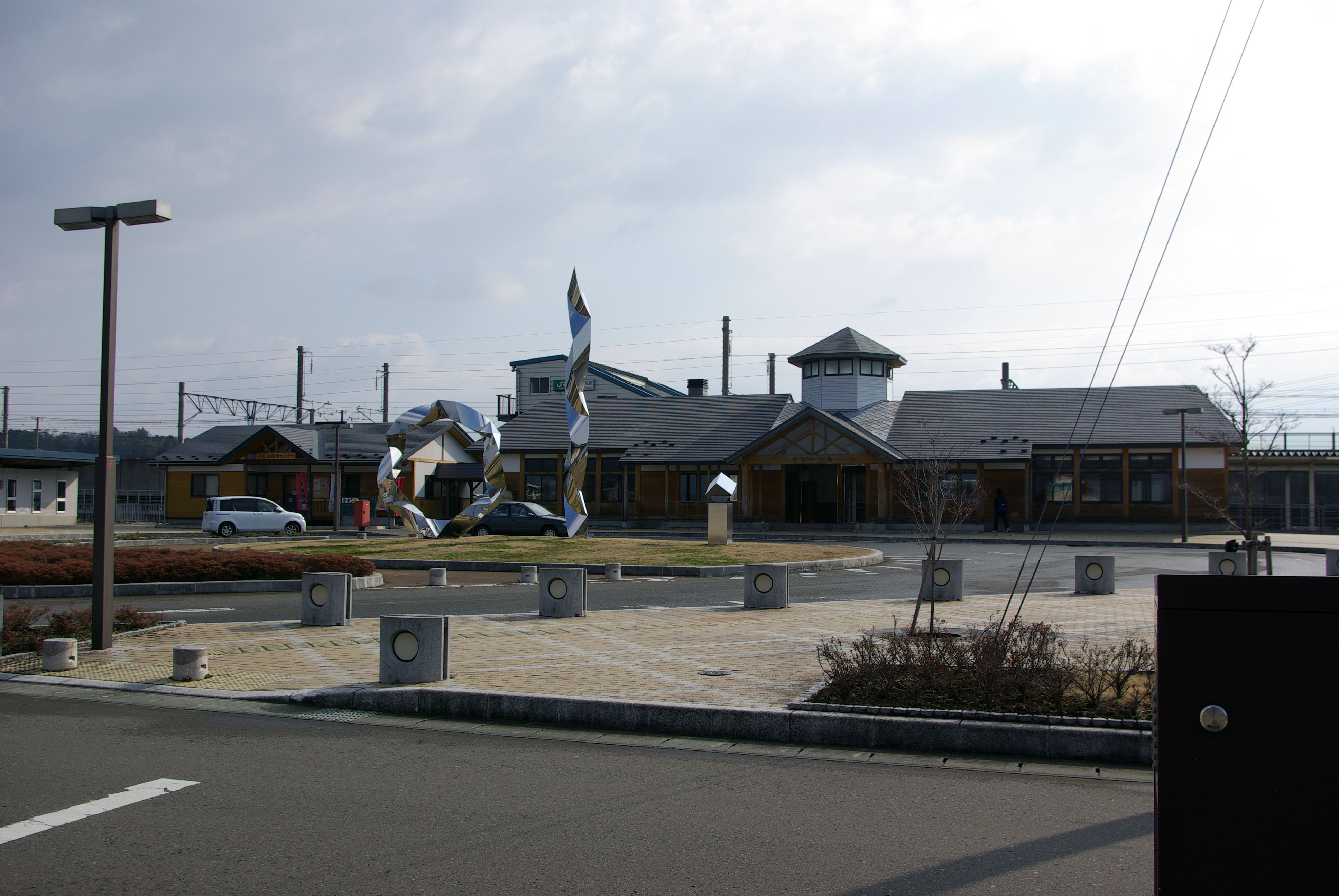 JR東北本線紫波中央駅